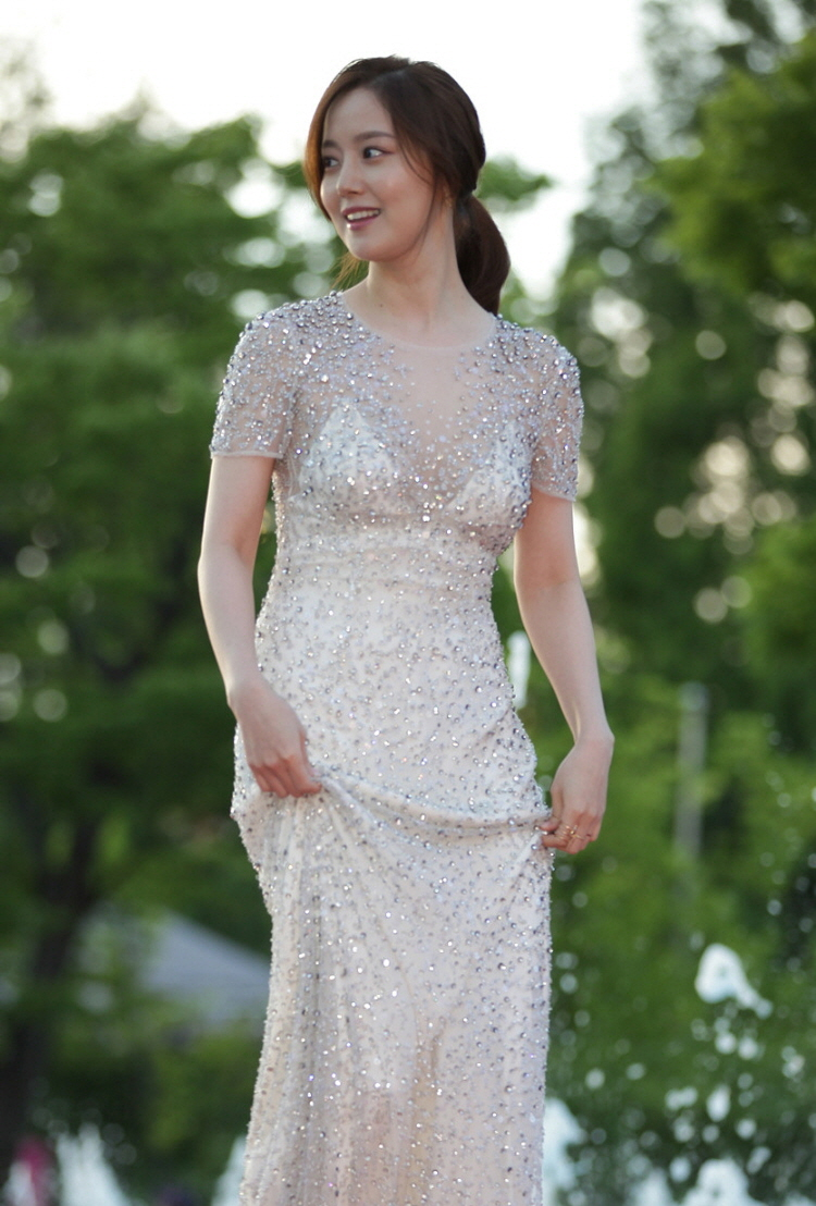 제19회 부천국제판타스틱영화제 레드카펫 part.3